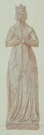 Zeichnung der Statue der böhmischen Königin Beatrice de Bourbon in der Pariser Basilika St. Denis, ehemals in der Kirche des Jacobinerkonvents